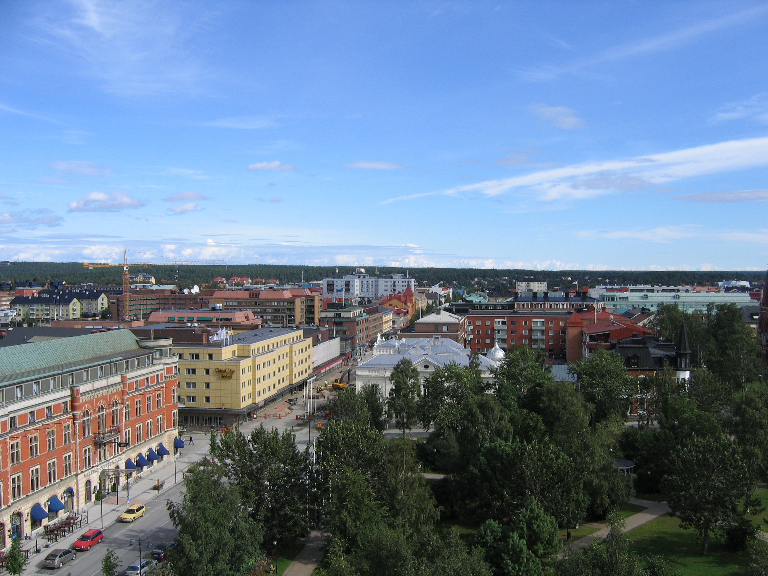 Luleå, taken 16/08/2005